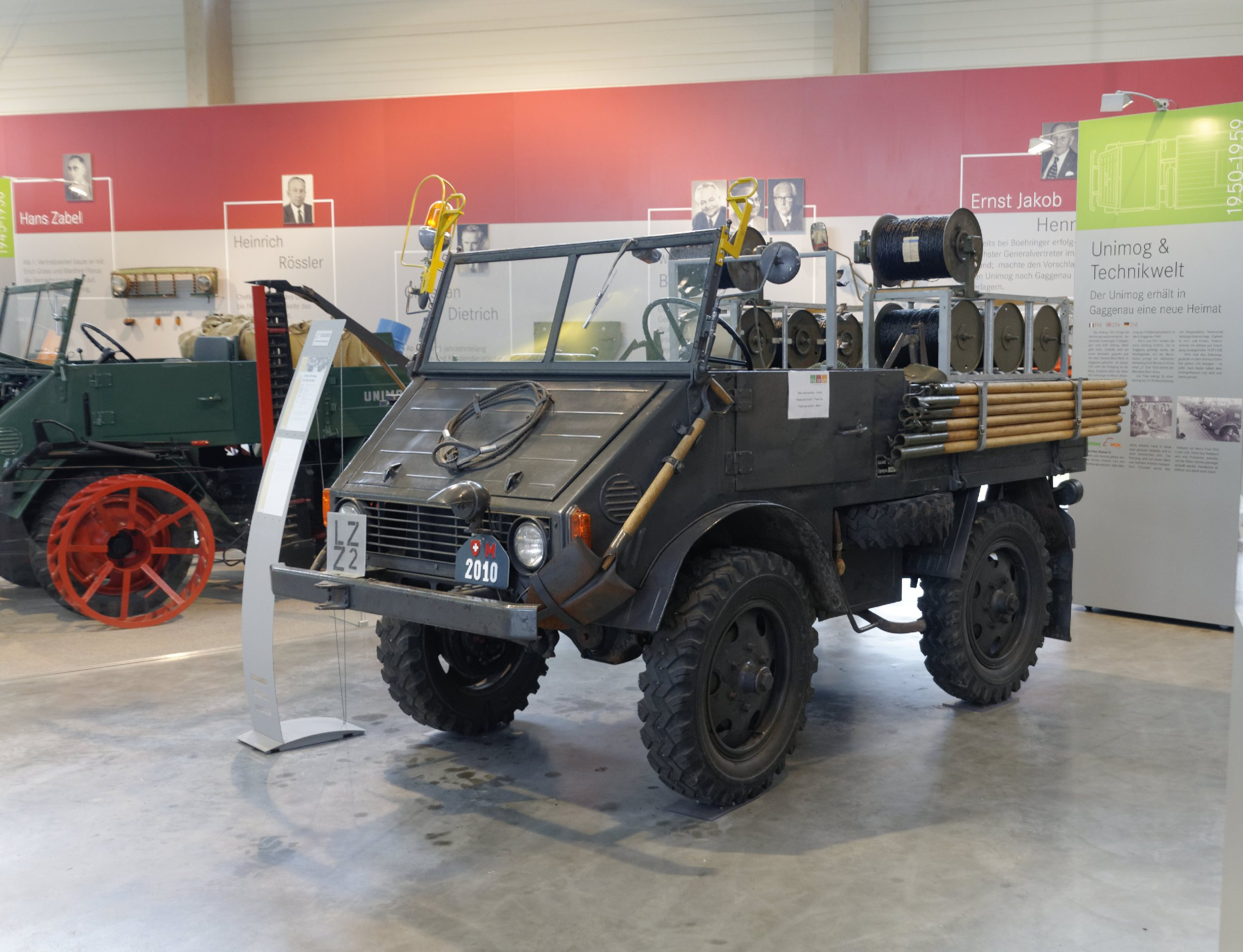 Gaggenau -Unimog-Museum